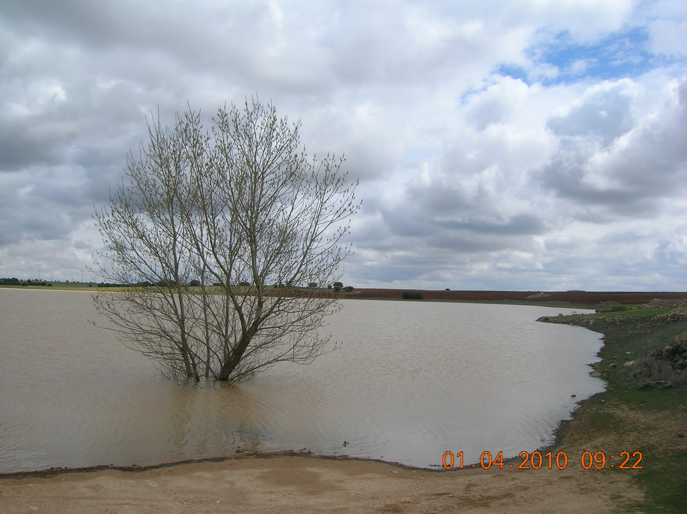 Laguna de Navalcudia (Complejo Lagunar homónimo). Primeras fuentes del río Anas